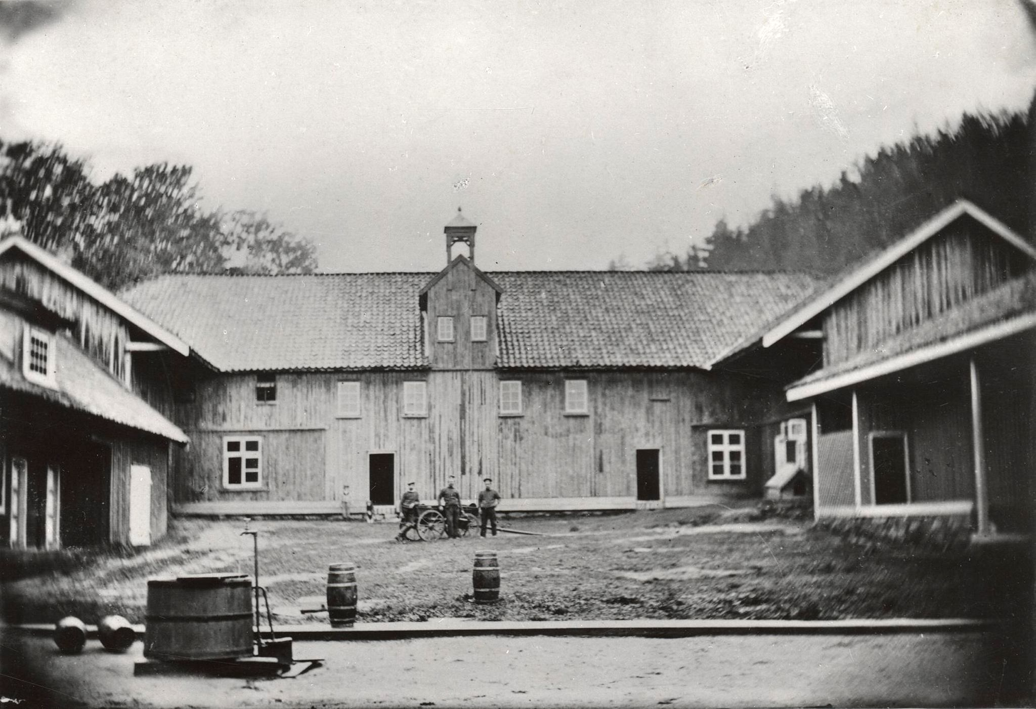 Fra indre gård i Bolvig jernverk, Skien